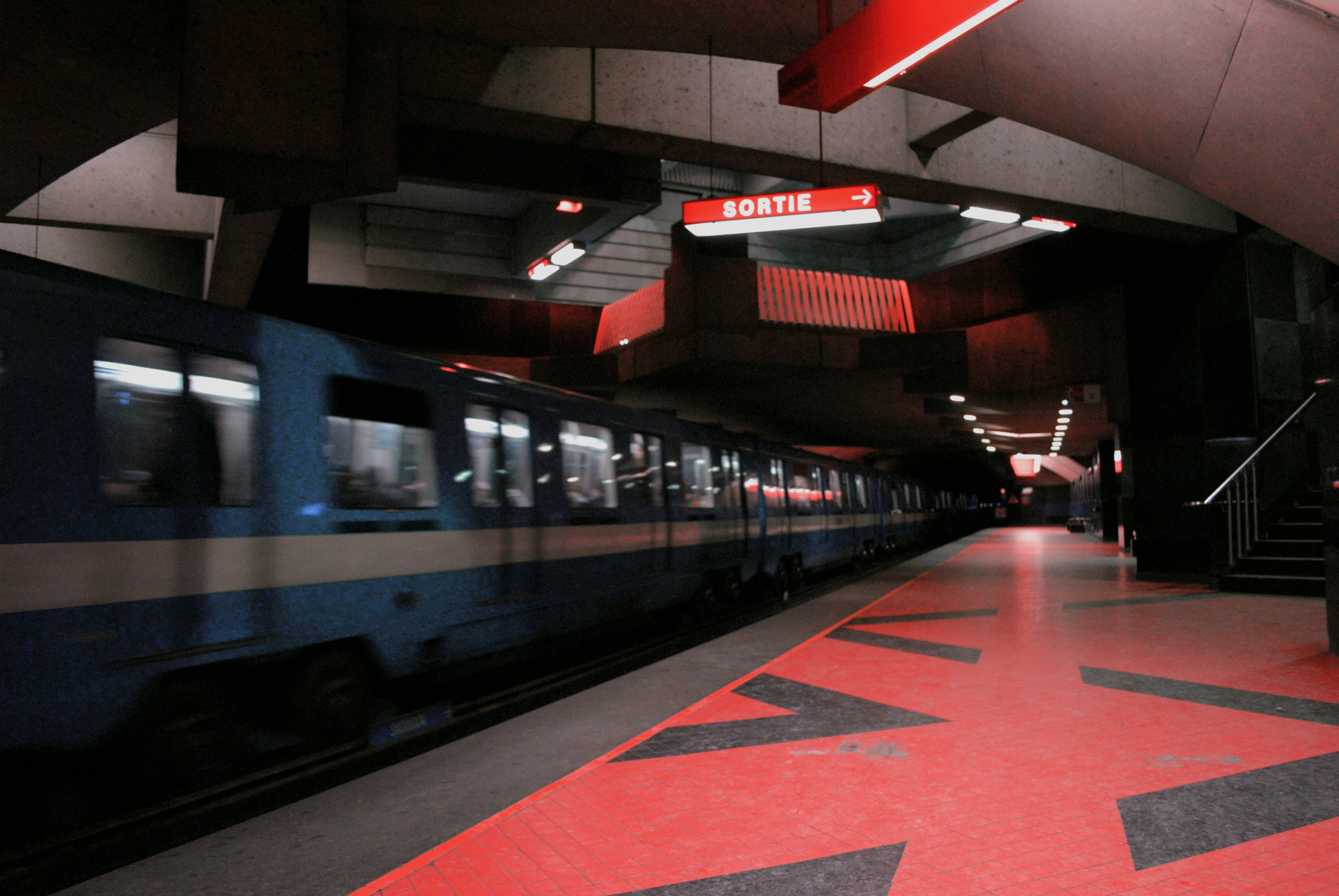 Station Acadie du Métro de Montréal